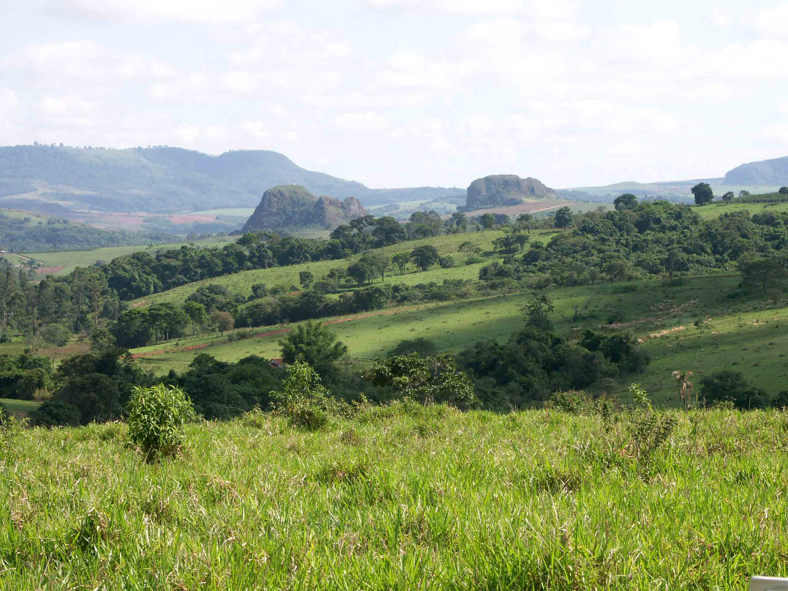 Monte Santo, Minas Gerais, BR